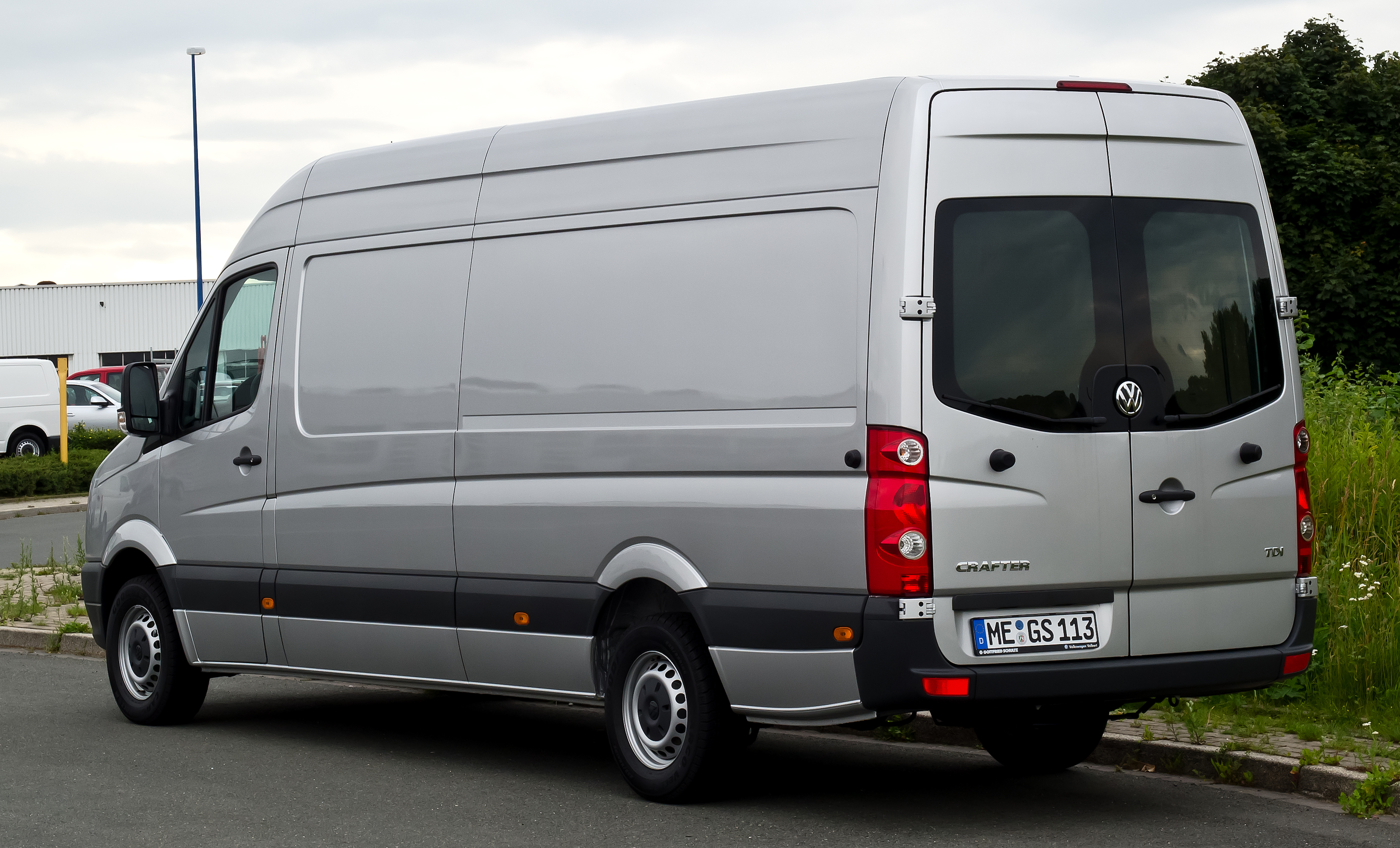 VW Crafter 2.0 TDI (Facelift)